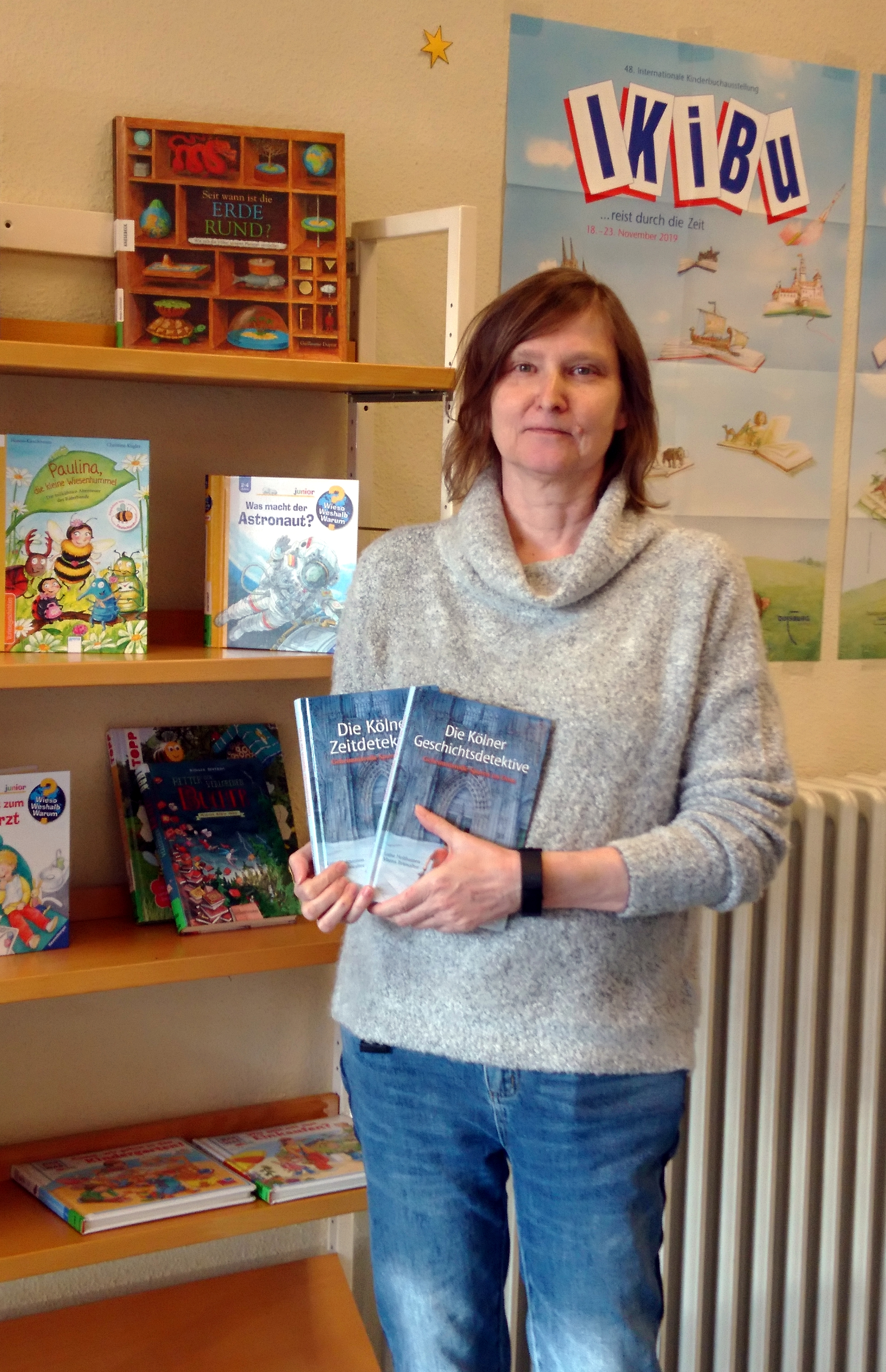 Luise Holthausen (* 1959 in Nürnberg), deutsche Kinderbuch-Autorin auf der Internationale Kinder- und Jugendbuchausstellung (IKiBu) 2019 in der Stadtbibliothek Duisburg